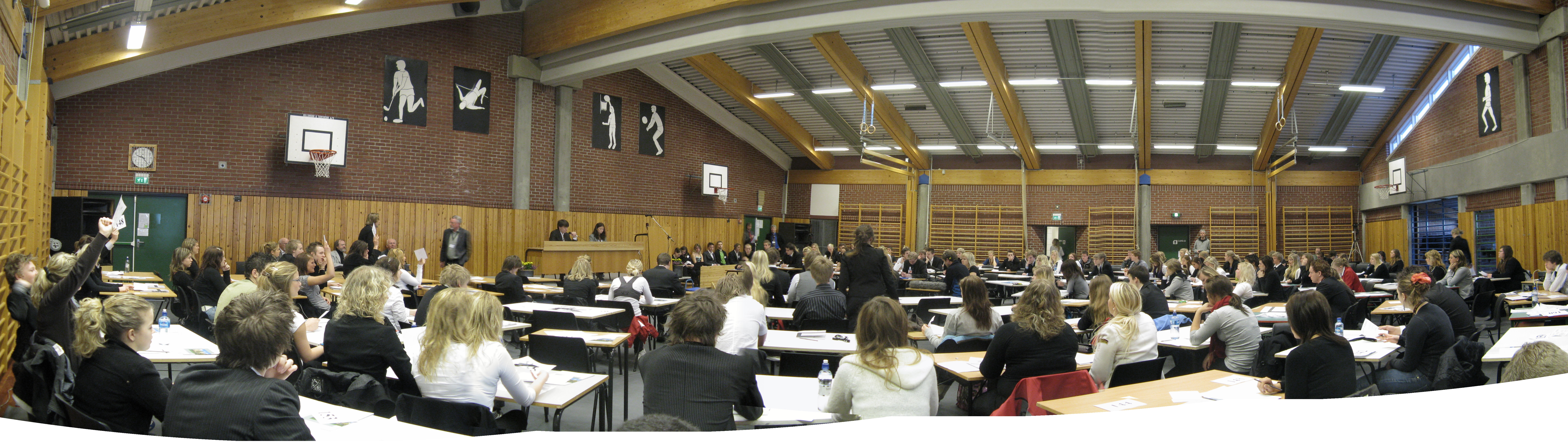 Bilde fra stortingssalen under det 13. miniStortinget på Strand videregående skole